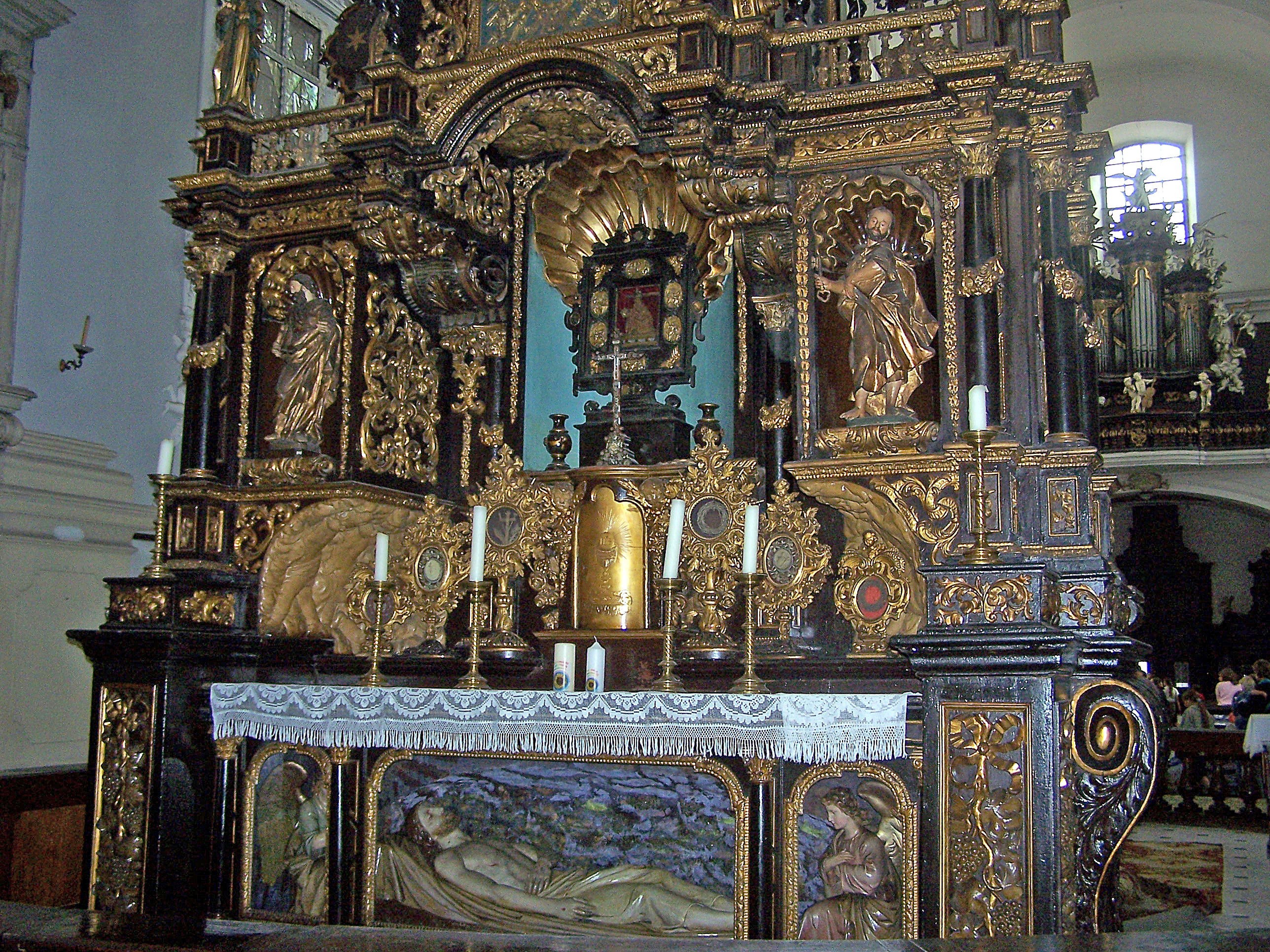 Kirche Mariaschein/Bohosudov, Rückseite des Hauptaltars